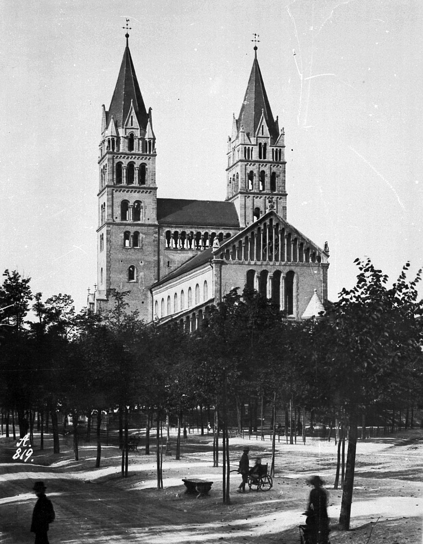 Maximilianskirche in München Isarvorstadt von NO. Vermutlich kurz nach der Fertigstellung 1901, da noch ohne Uhren. Hier noch mit den ursprünglichen Kirchturmspitzen.